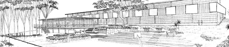 Projeto arquitetônico da fachada no futuro SENAI Nami Jafet